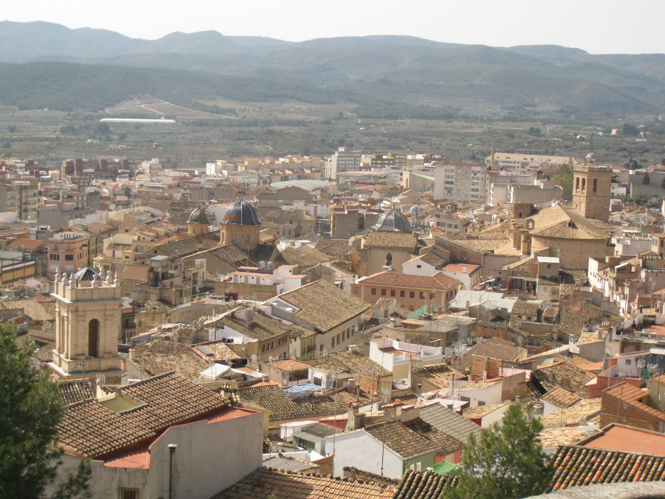 Nucli històric de Sogorb